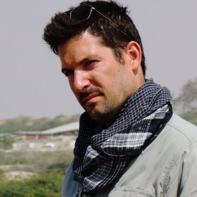 Brett Velicovich in Somalia